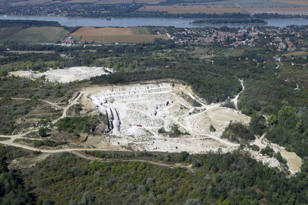 A süttői mészkőbánya madártávlatból